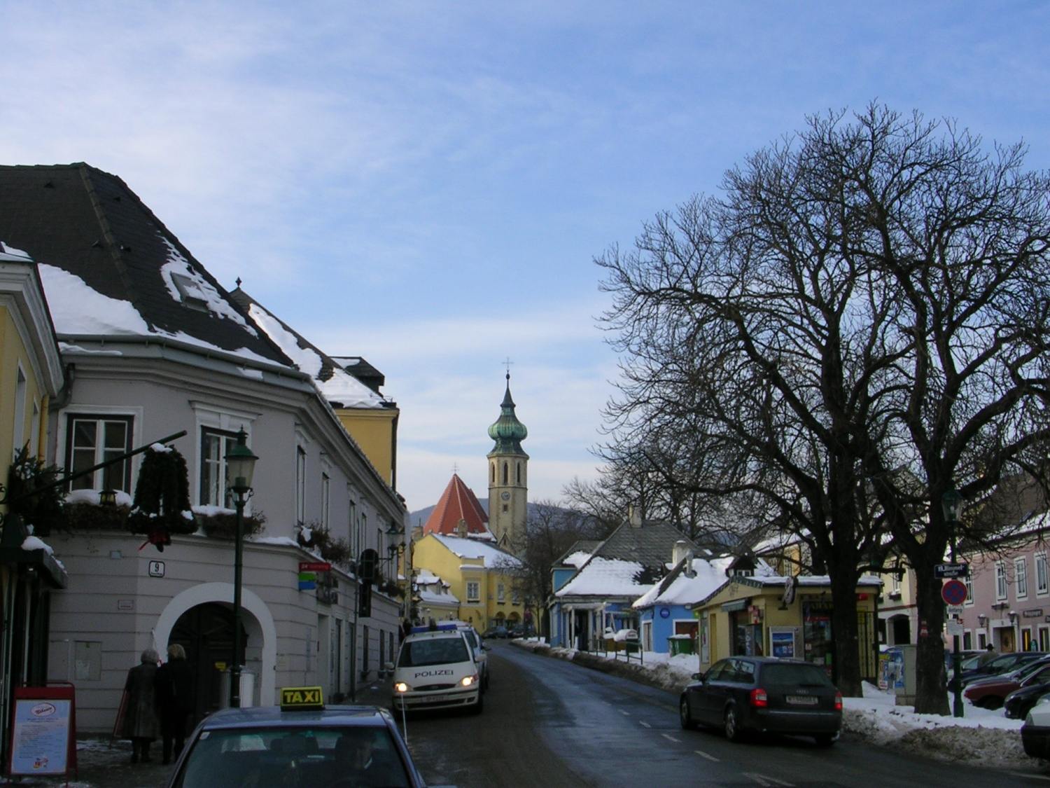 Grinzing mit Blick auf die Pfarrkirche